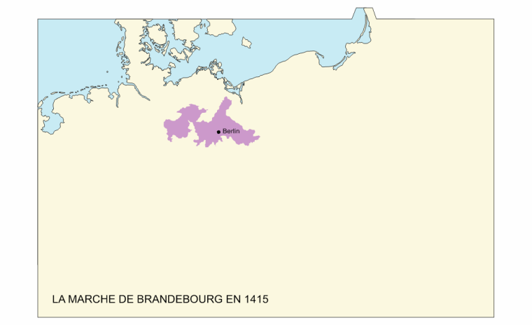 La Prusse en 1415